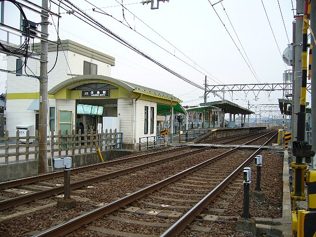 近鉄長島駅